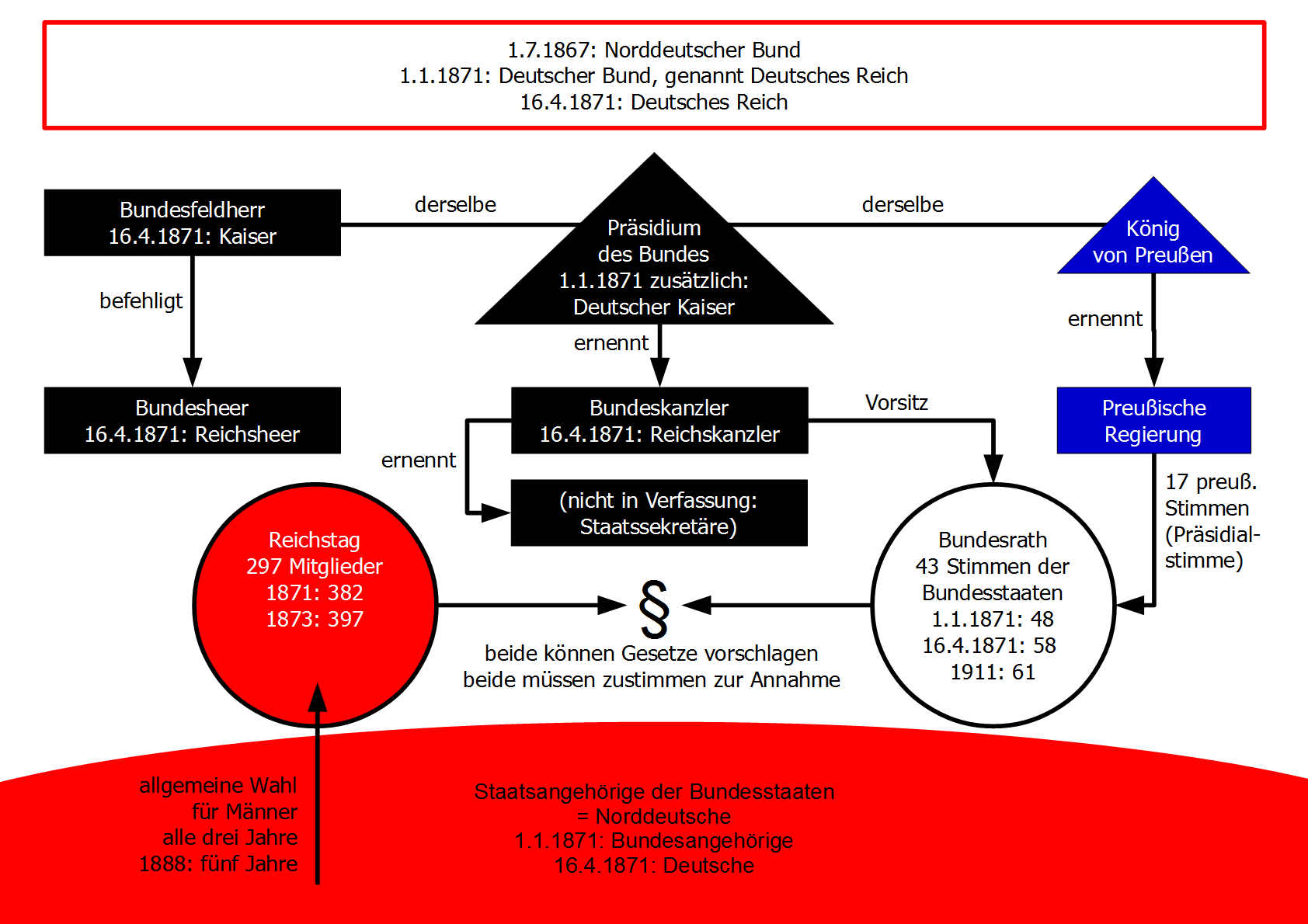 Verfassungsdiagramm (Schema) zur "Bismarckschen Reichsverfassung" von 1867 und Folgejahren. Mit Entwicklung der Bezeichnungen sowie der Anzahlen der Reichstagsmitglieder und Bundesratsstimmen.